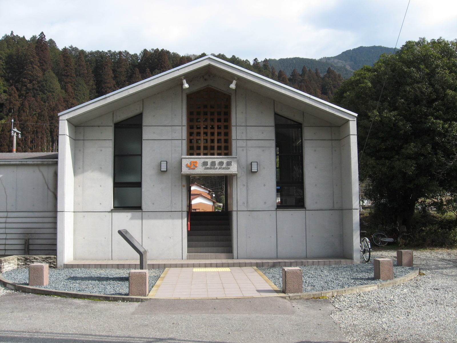 禅昌寺駅駅舎